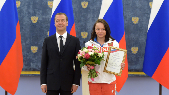 Вручение благодарностей Правительства Российской Федерации, Дмитрий Медведев с гимнасткой Марией Пасекой